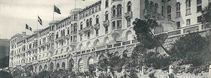 Hotel Riviera Palace. Inspiración para Hotel Miramar Málaga.